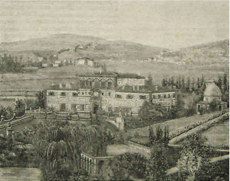 Villa palmieri, 1896